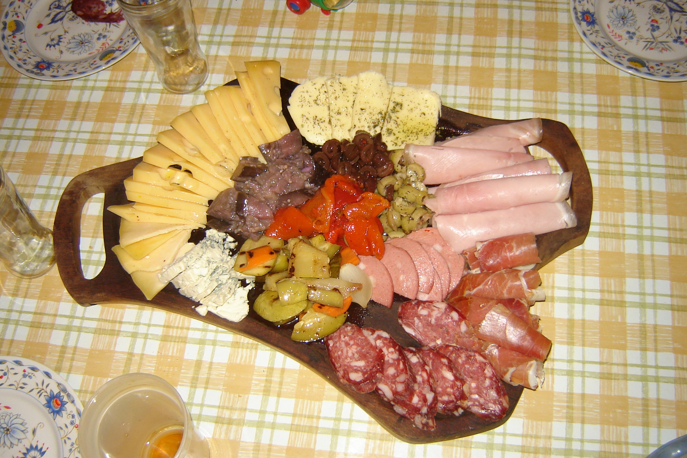 Picada cordobesa - Argentina